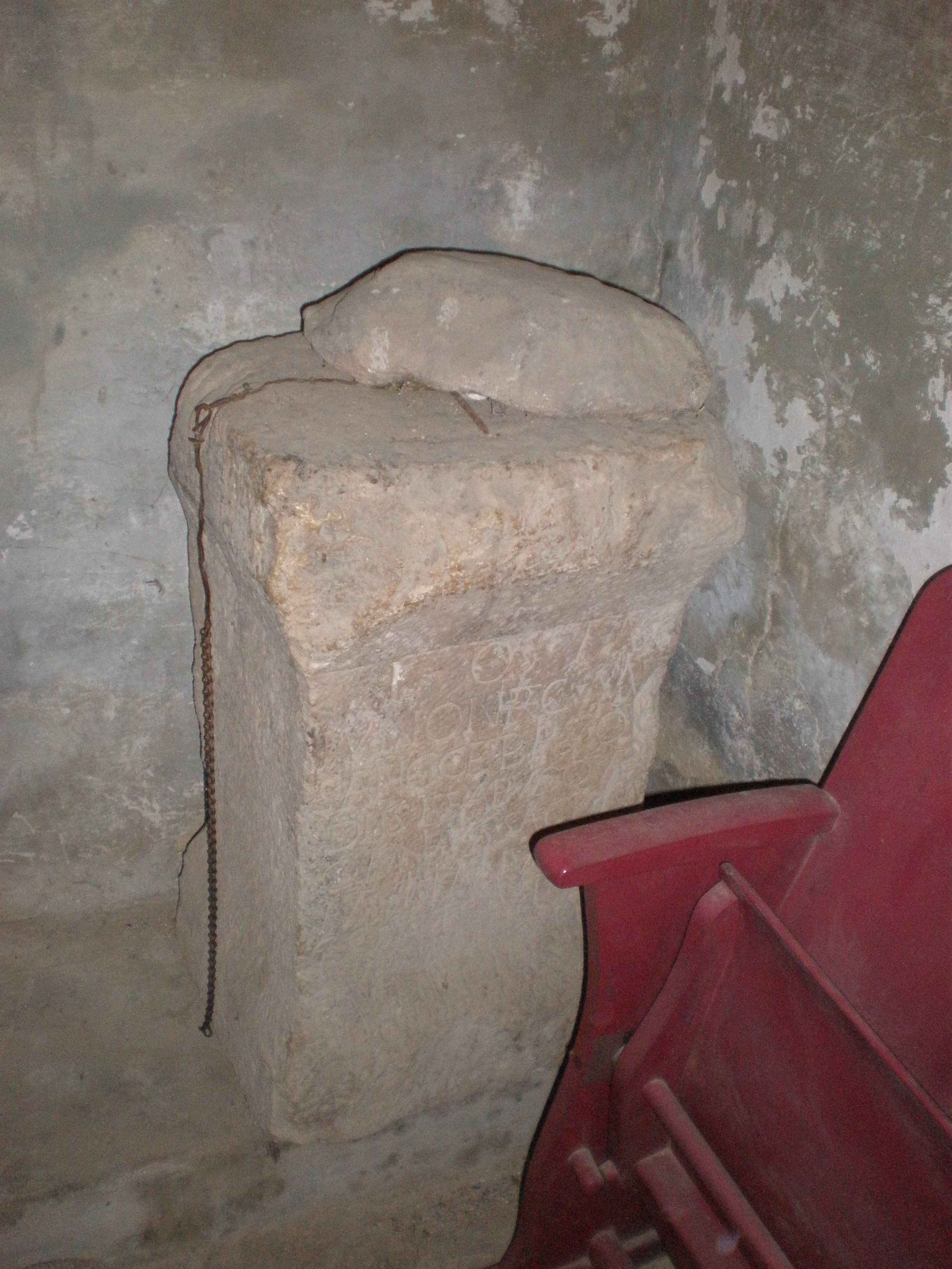 Камен со римски натпис во црквата во село Блаце